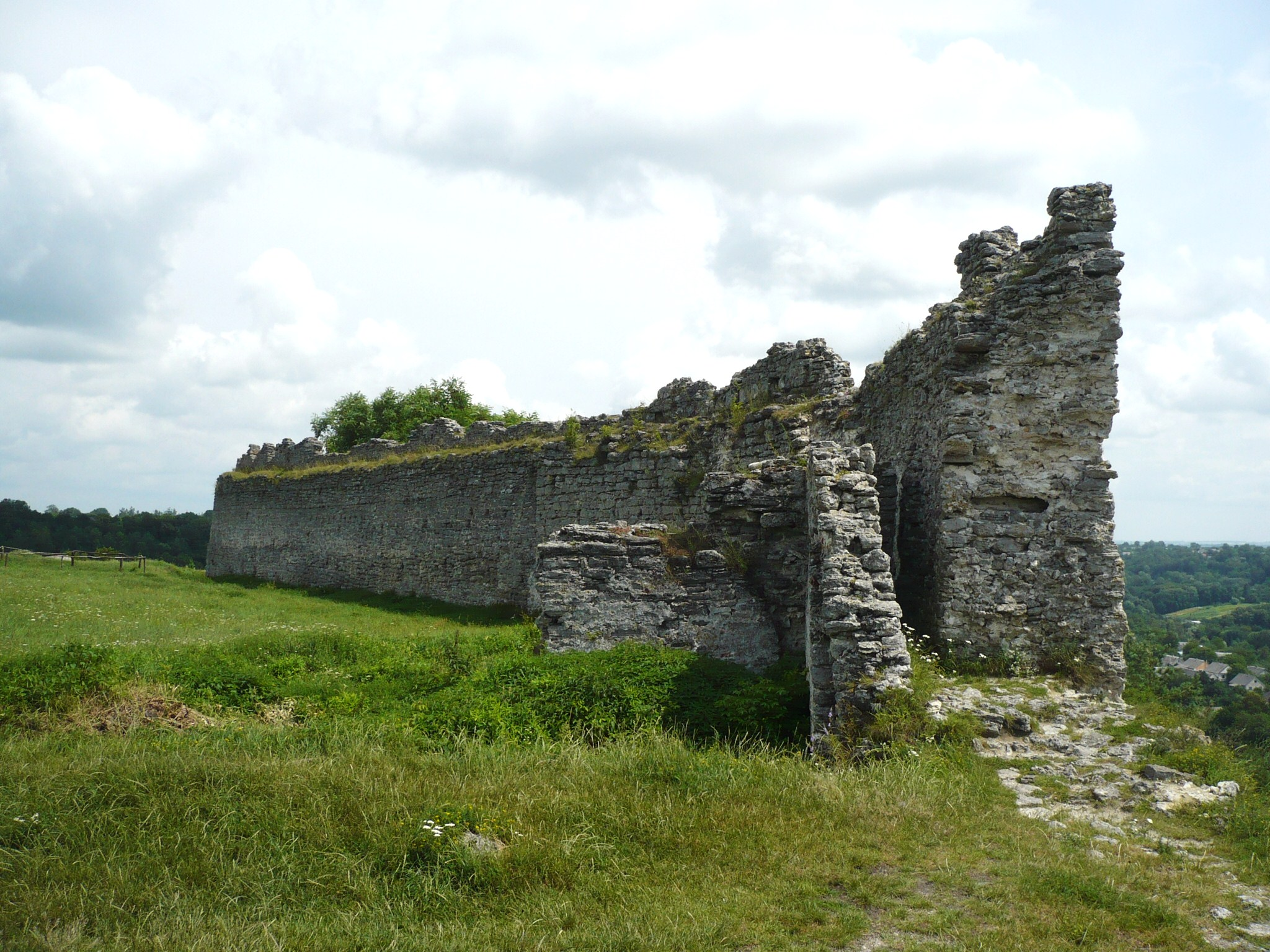 Zamek w Krzemieńcu